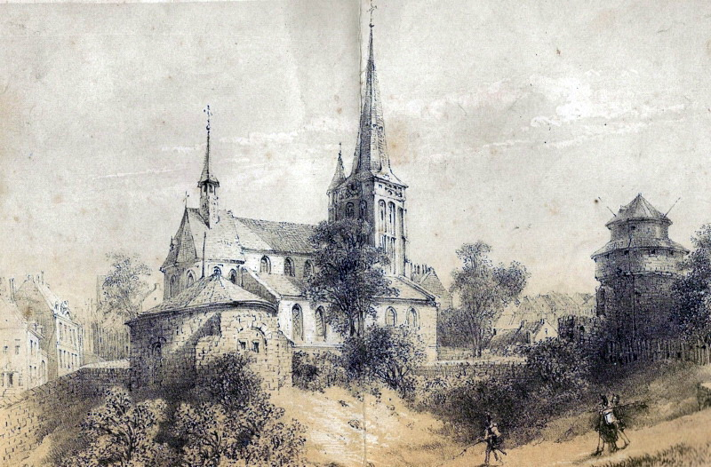 Lithografie door Alexander Schaepkens van een gezicht op de oude Sint-Maartenskerk, in 1853 gesloopt, en rechts de Wycker Kruittoren, afgebroken in 1868. Rechtsonder enkele soldaten van het garnizoen met bepakking. Collectie RHCL, Maastricht.